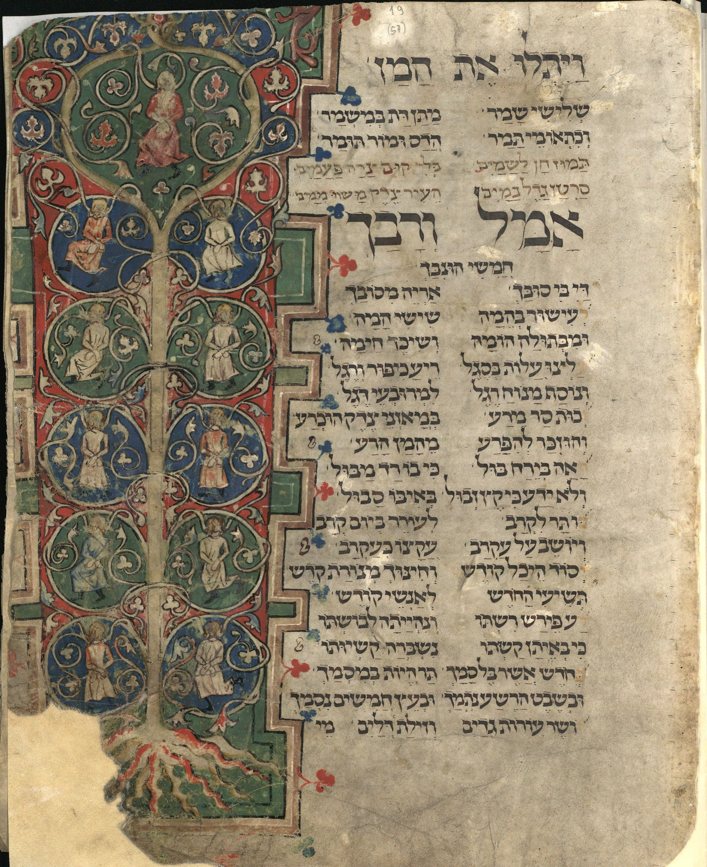 עמוד מתוך הקרובה לפורים "ויאהב אומן" במחזור וורמייזא. בעמוד ישנו סוף פיוט ההרחבה "אספרה אל חוק" ותחילת פיוט ההמשך "אמל ורבך". בצד שמאל צויר המן תלוי על עץ עם עשרת בניו והודגשו המילים "ויתלו את המן"